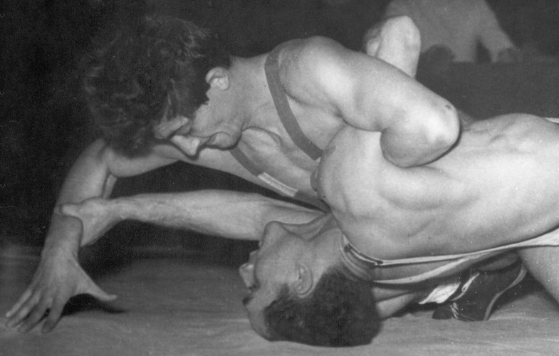 Dumitru Pârvulescu, 1960 Olympics